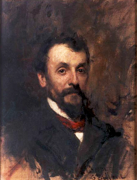 Ritratto del poeta Gaetano Crespi realizzato dal pittore Cesare Tallone.